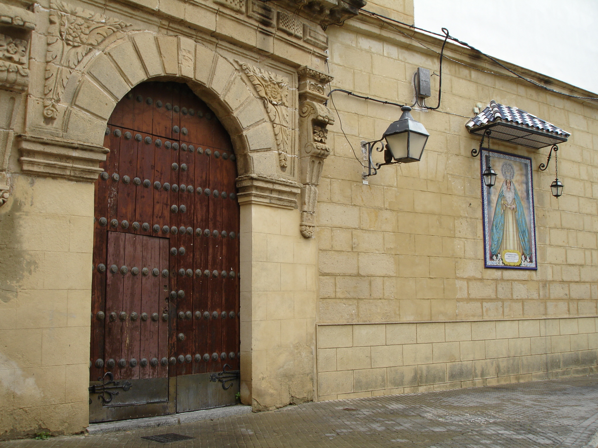 Convento frente a "El Salvador"